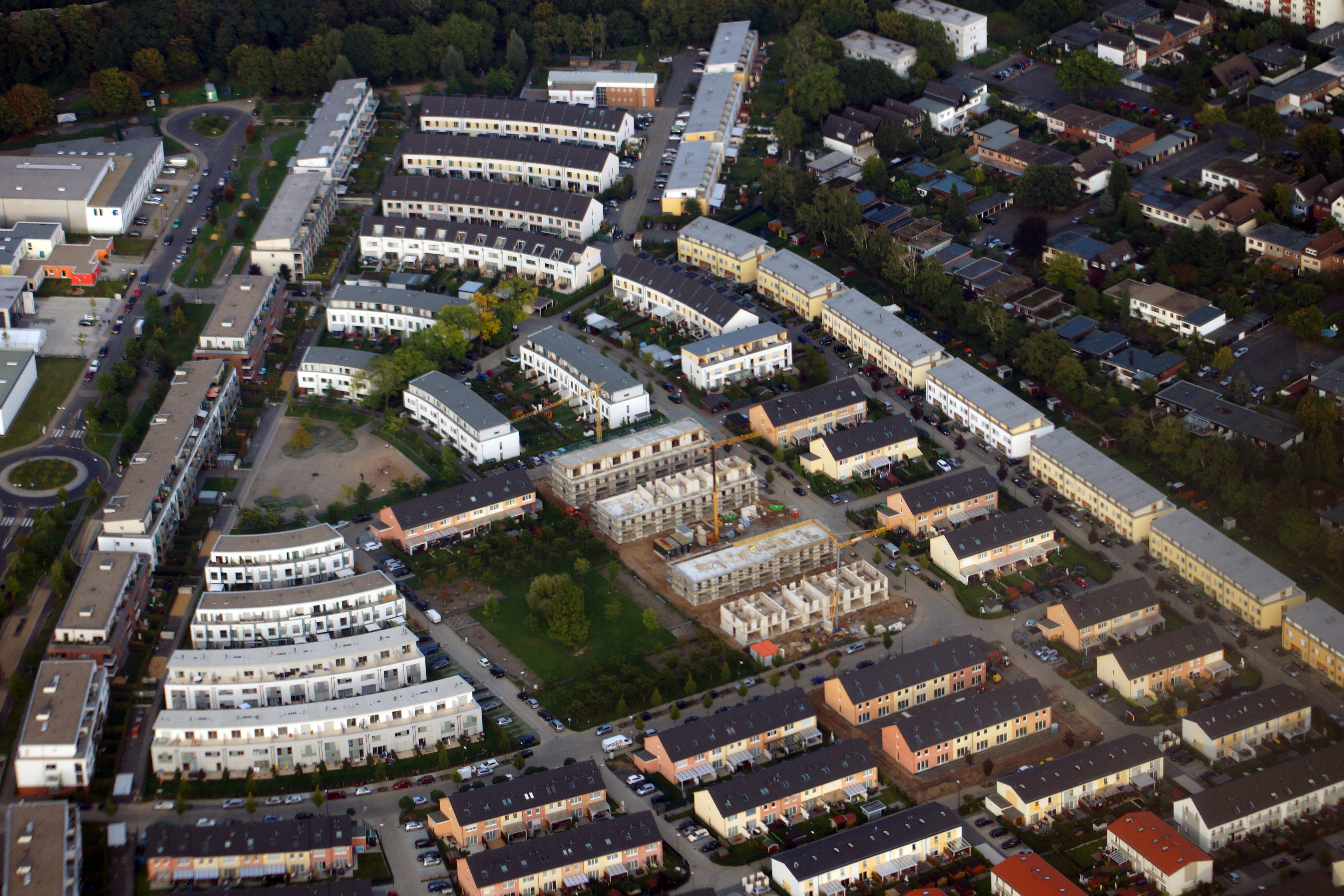 Der südöstliche Teil des Neubaugebiets Merheimer Gärten in Köln-Merheim .